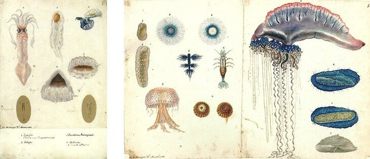 Михайлов Павел Николаевич - Морские моллюски